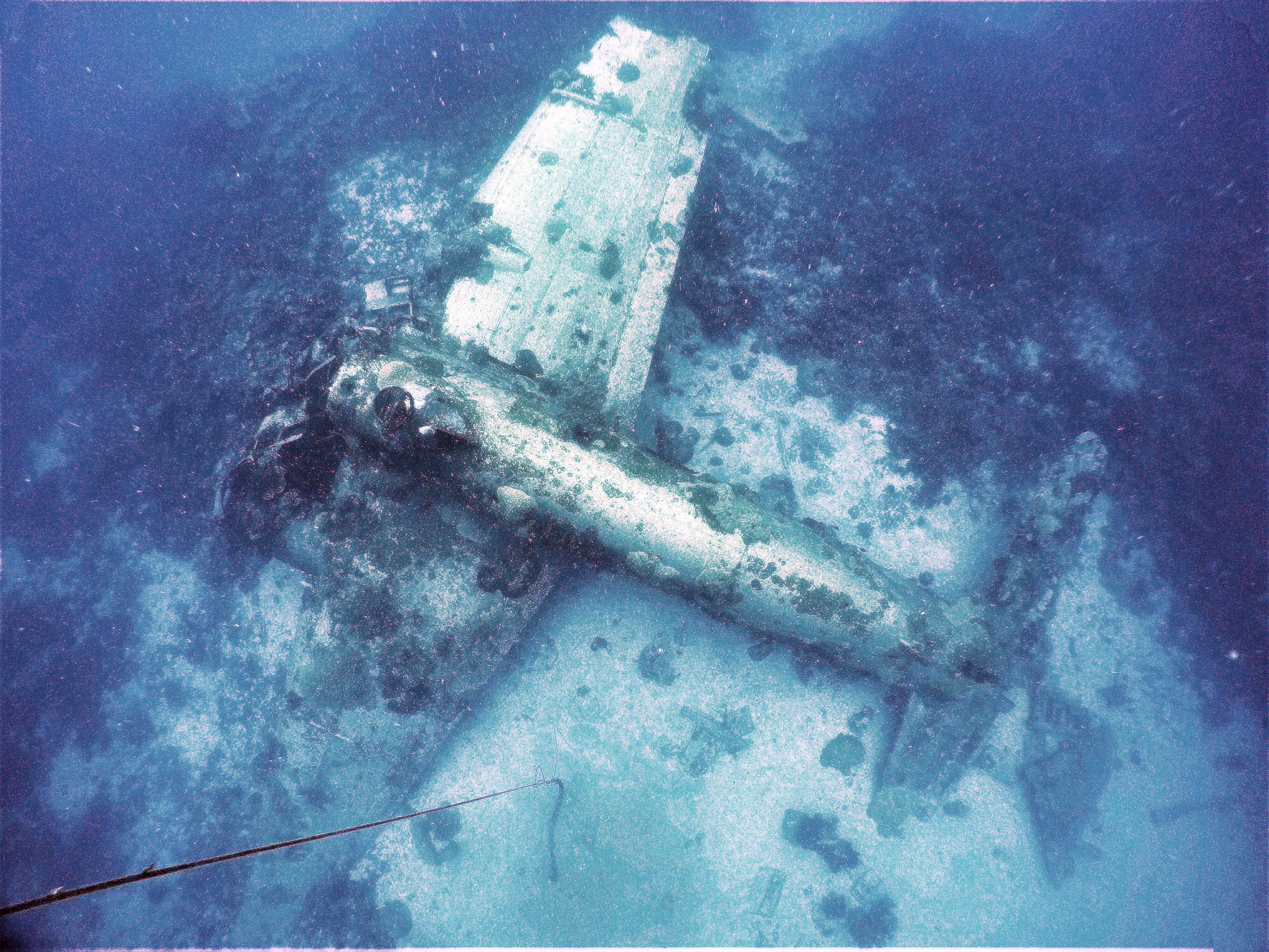 Betty bomber